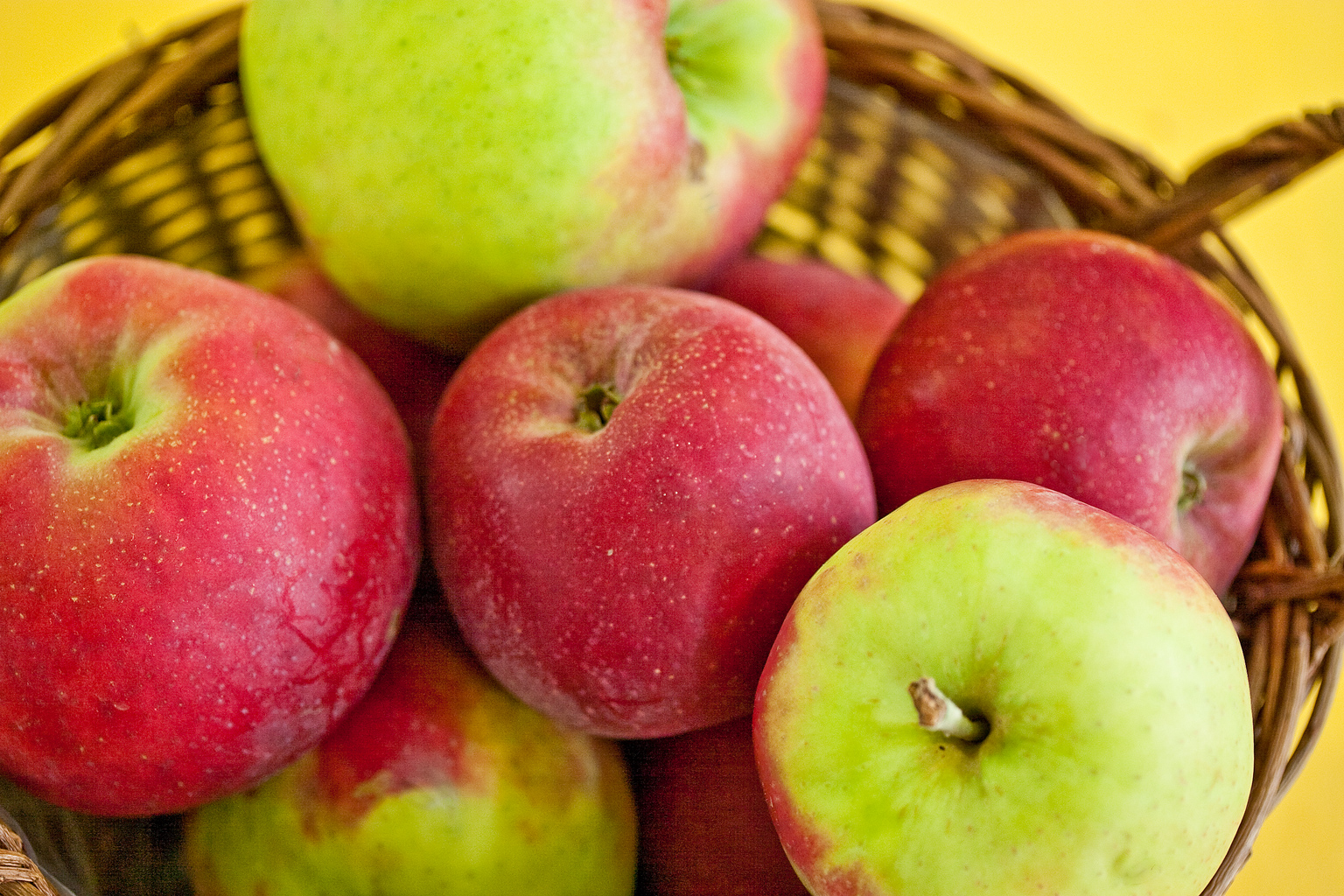 Der Gascoynes_Scharlachrote ist eine Apfelsorte